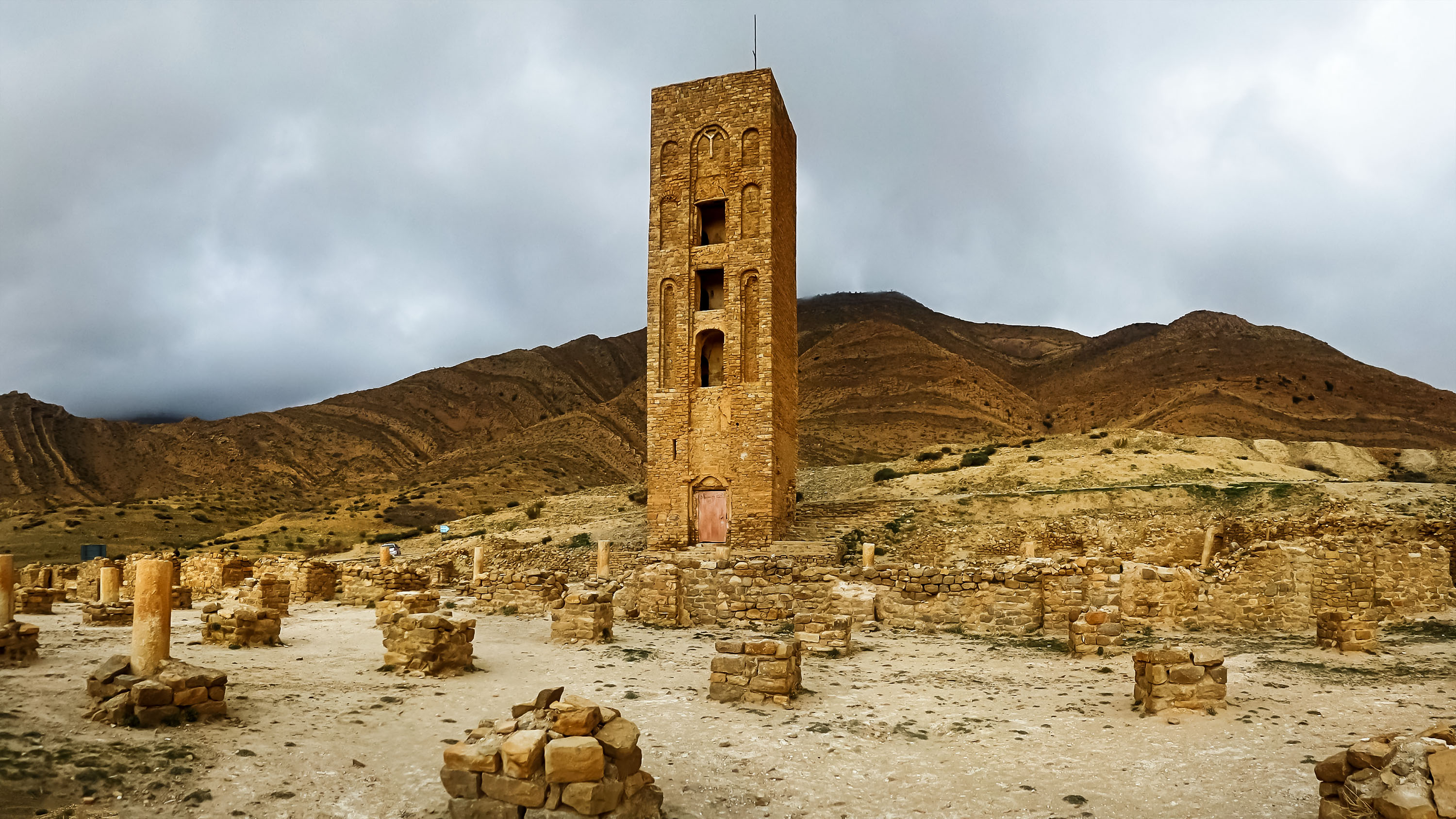 موقع آثار قلعة بني حماد ببلدية المعضيد - ولاية المسيلة - الجزائر